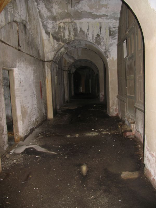 Prøvestensfortet (Prøvestenen), forbindelsesgangen i fortet